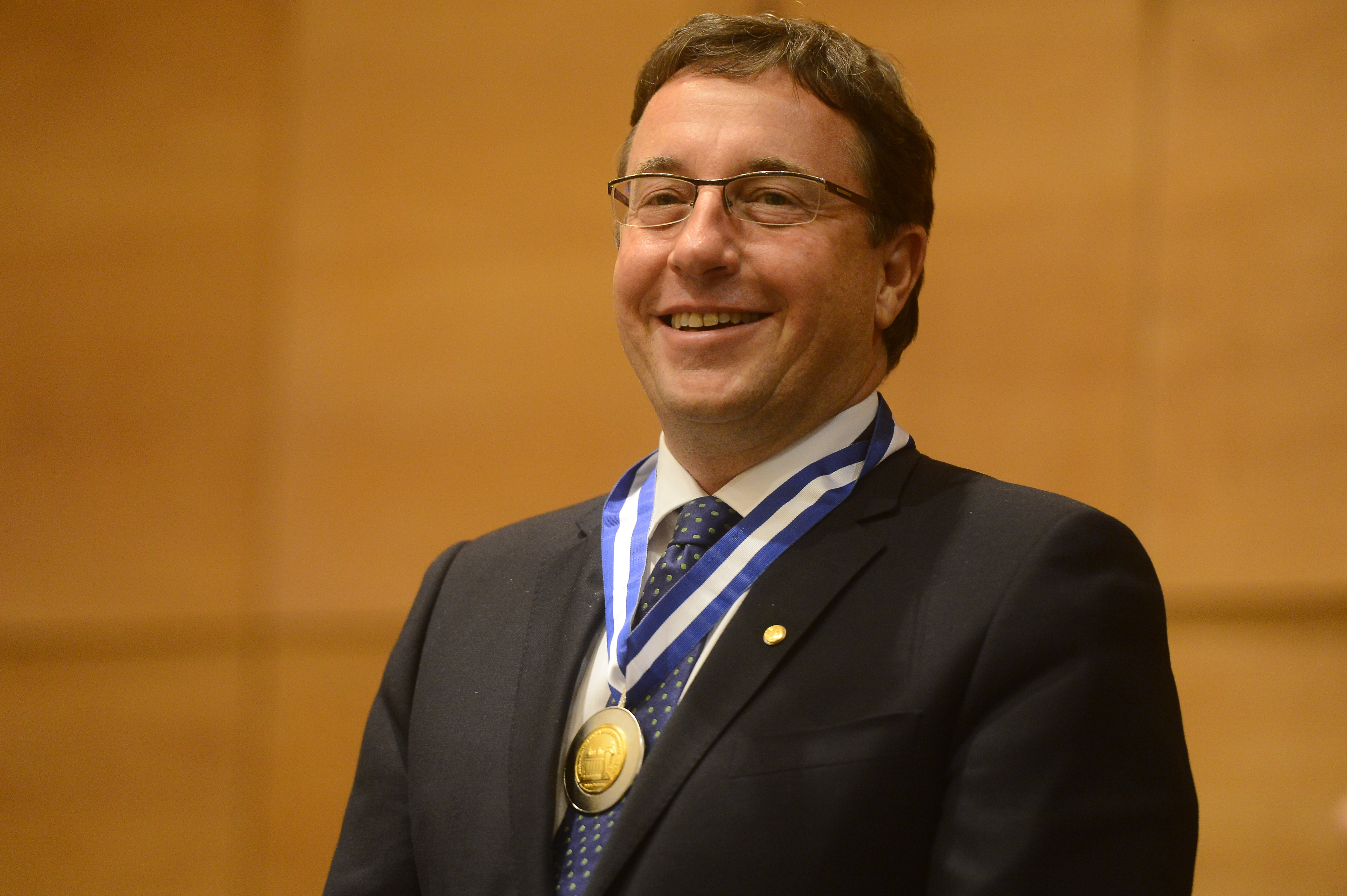 Rio de Janeiro - O diretor-executivo da ONU para o Meio Ambiente e subsecretário-geral da ONU, Achim Steiner, recebe título de Cidadão Honorário do Rio de Janeiro e a Medalha Tiradentes (Fernando Frazão/Agência Brasil)